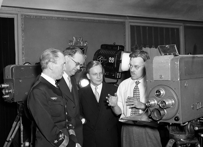 Hötorget 8, Konserthuset. Statsminister Tage Erlander, flygvapenchefen Nordenskiöld och Elektronikbolagets chef S. Jansson får en demonstration om television av Mr Walter Lawrence från RCA